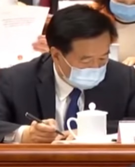 河南省委书记王国生在十三届全国人大三次会议上，2020年5月22日。